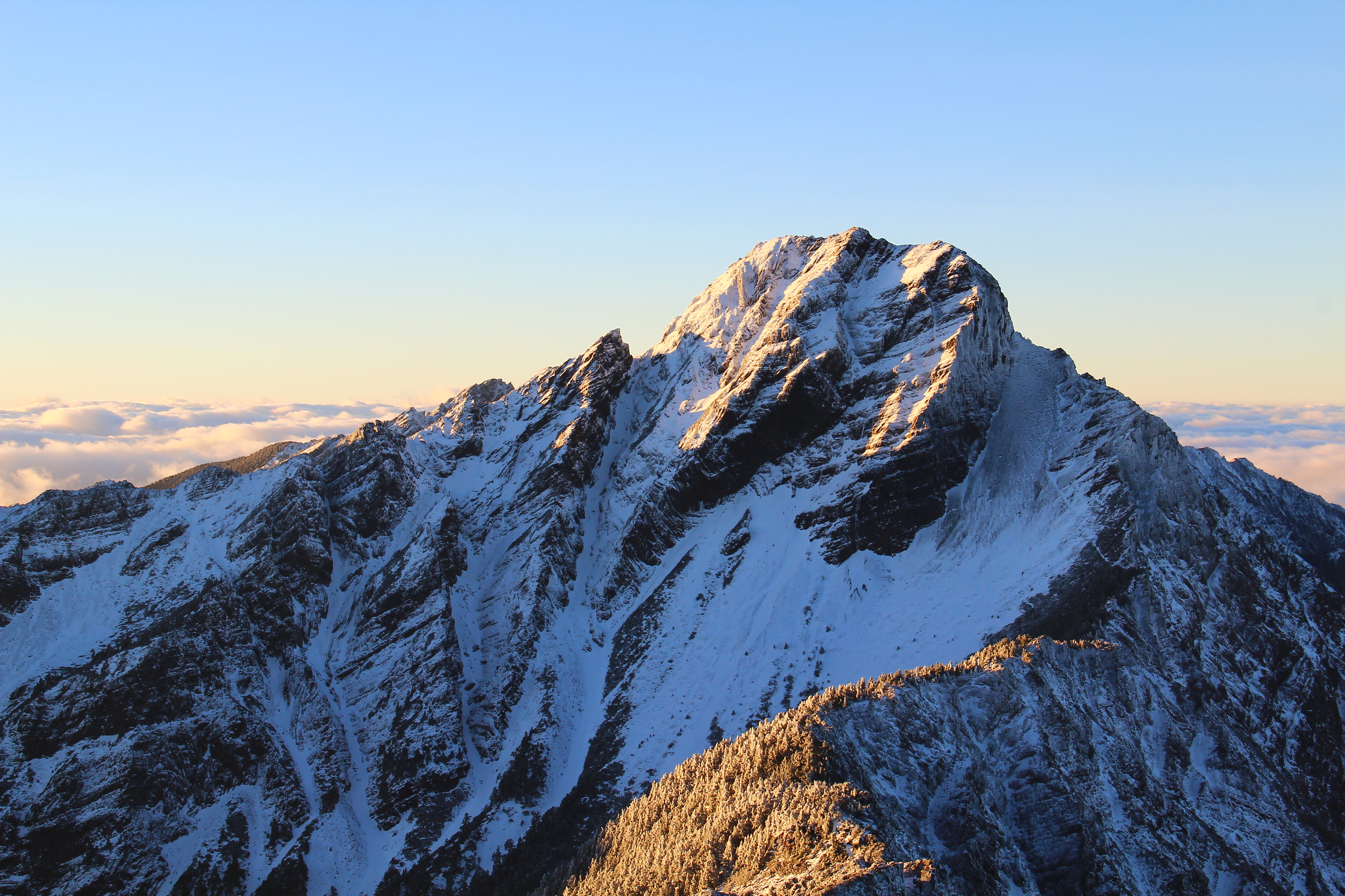 冬季的玉山主峰(於氣象站拍攝)